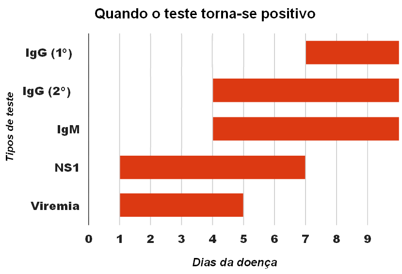 gráfico em português